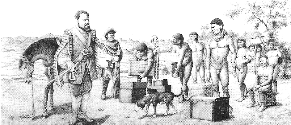 Teodósio de Oliveira Lêdo junto com os índios Ariús